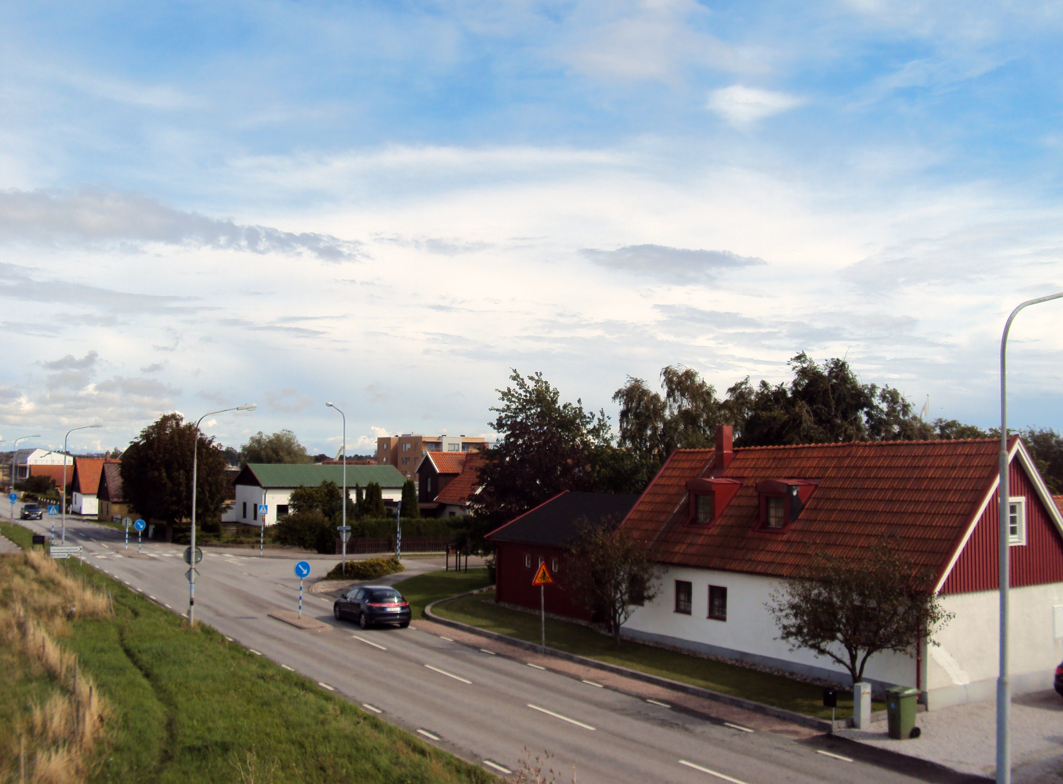 Vy över Höllviken från Kungshögen